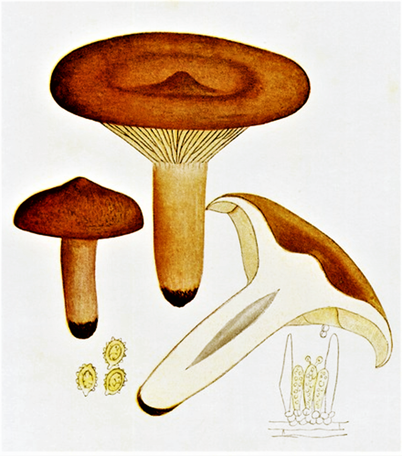 Bres.: Lactarius rufus (Scop., 1772 ex Fr. (1838)